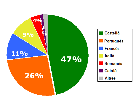 Percentatges de llengües romàniques parlades en comparació al total de parladors de llengües romàniques